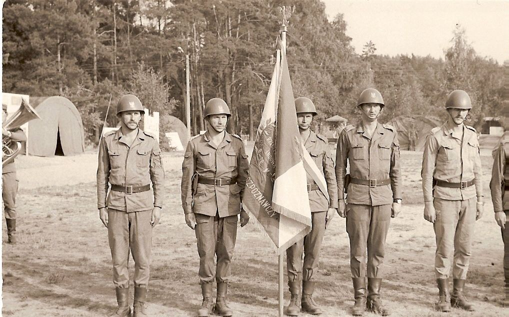 sztandar 2 batalionu rozpoznawczego na poligonie Wędrzyn. Ośrodek szkolenia rozpoznawczego - uroczyste rozpoczęcie szkolenia.